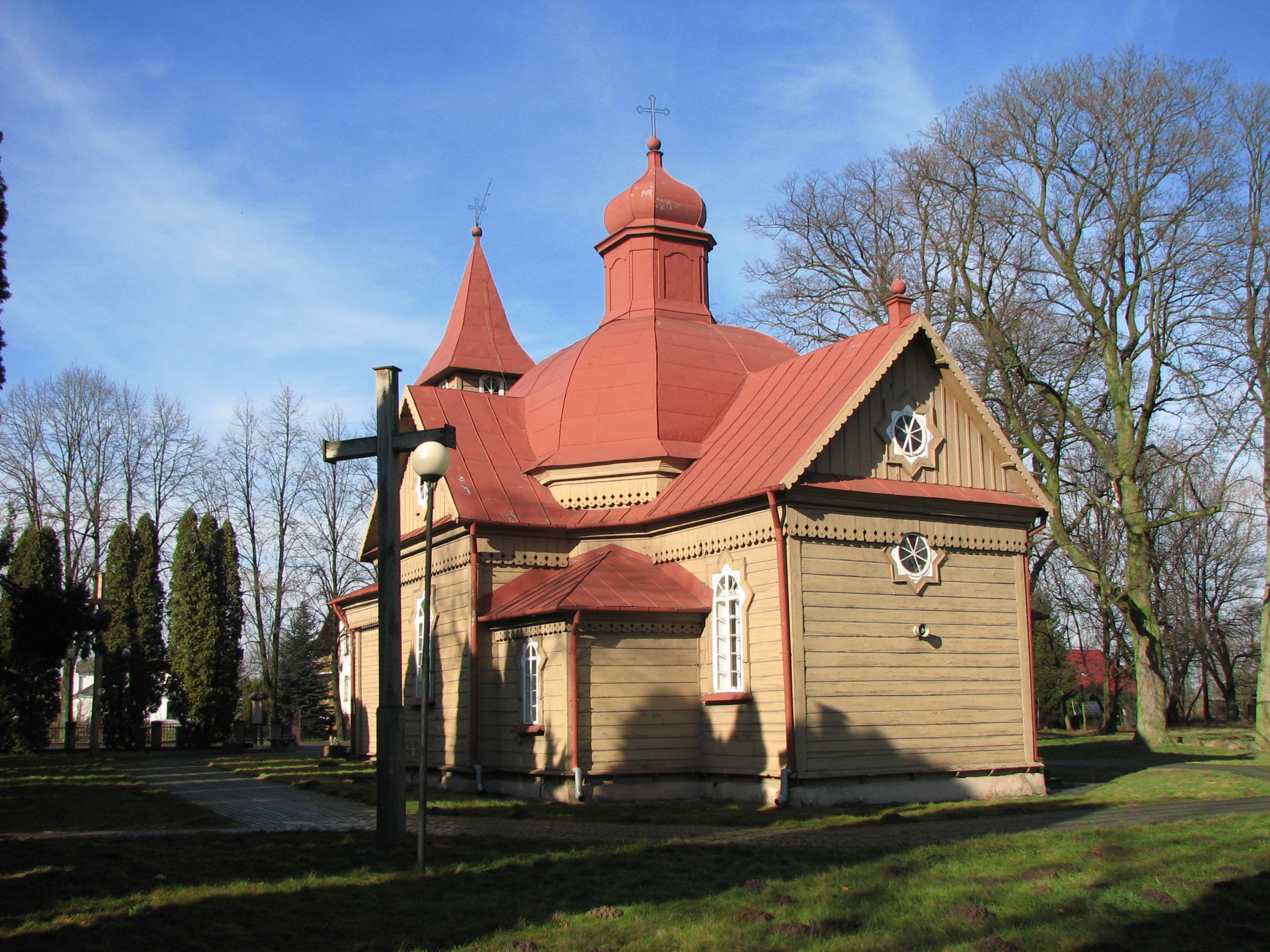 Rokitno - dawna cerkiew unicka, obecnie kościół rzymskokatolicki parafialny p.w. Świętej Trójcy (zabytek nr rejestr. A/68)